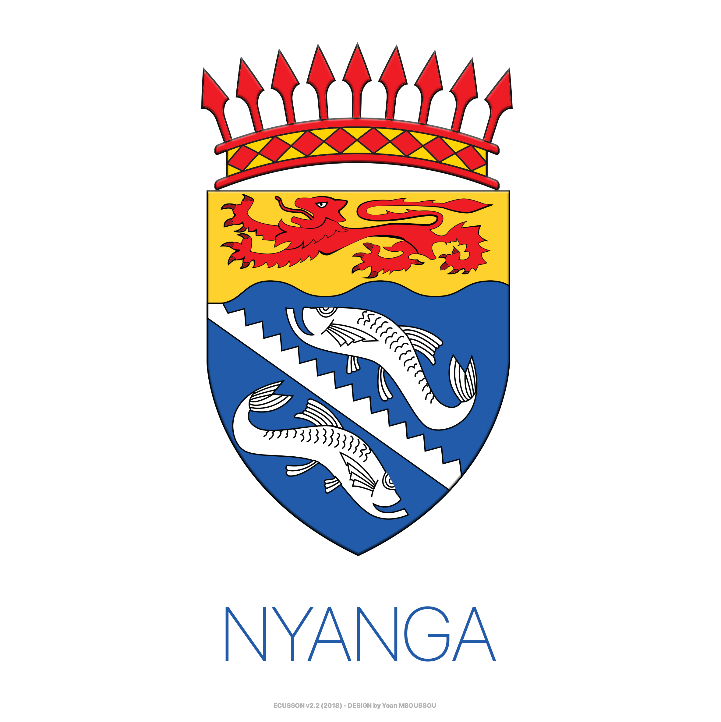 Ecusson de la province de la NYANGA (G5) - version 2018